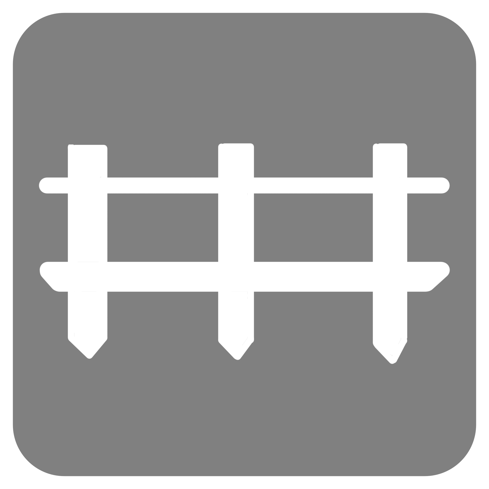 Símbolo utilizado para identificar a la estación Linderos en 2001.